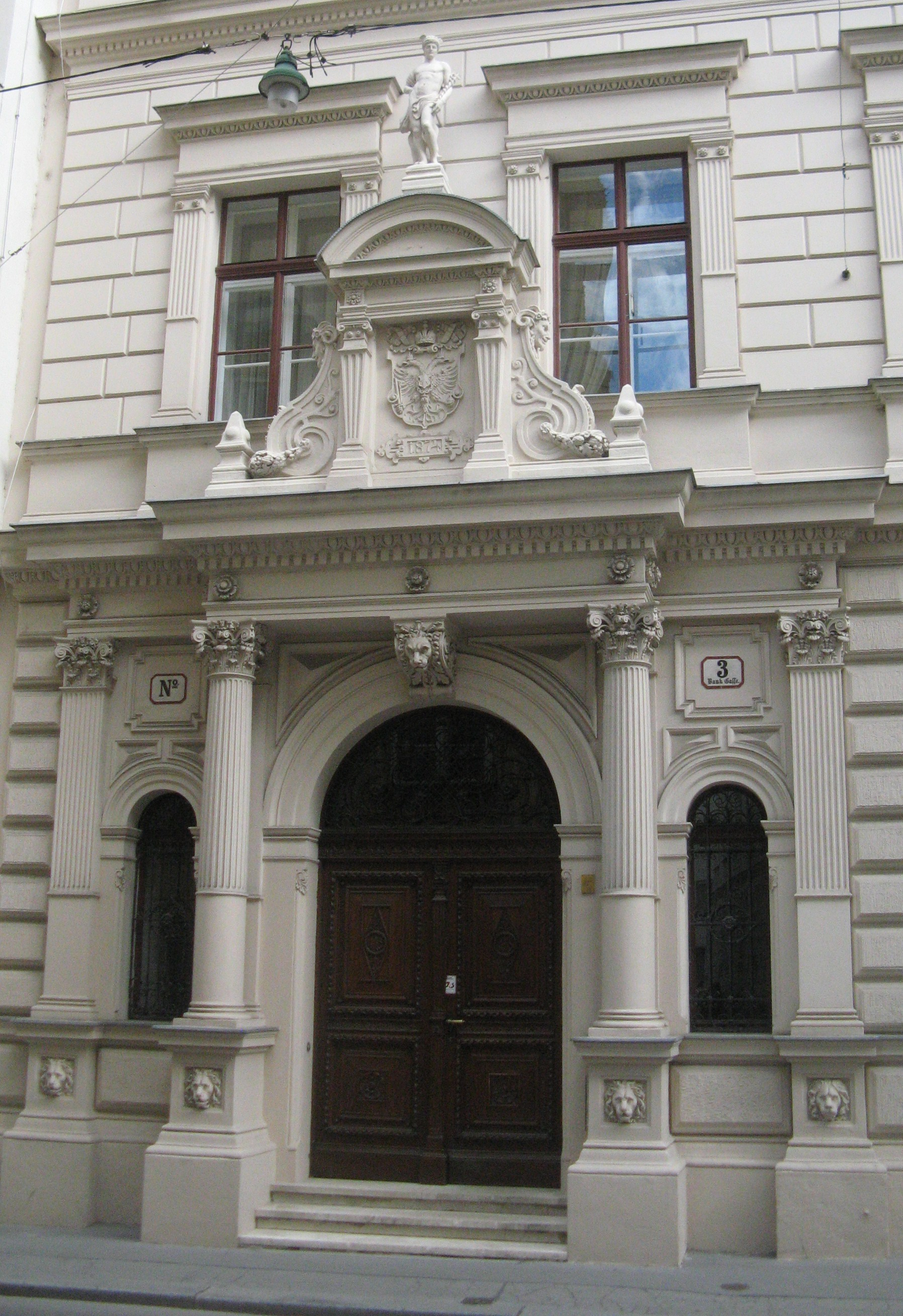 Portal des ehemaligen Verwaltungsgebäudes der Österreichisch-Ungarischen Bank (1872-75) von Friedrich von Schmidt, Bankgasse 3, Wien-Innere-Stadt